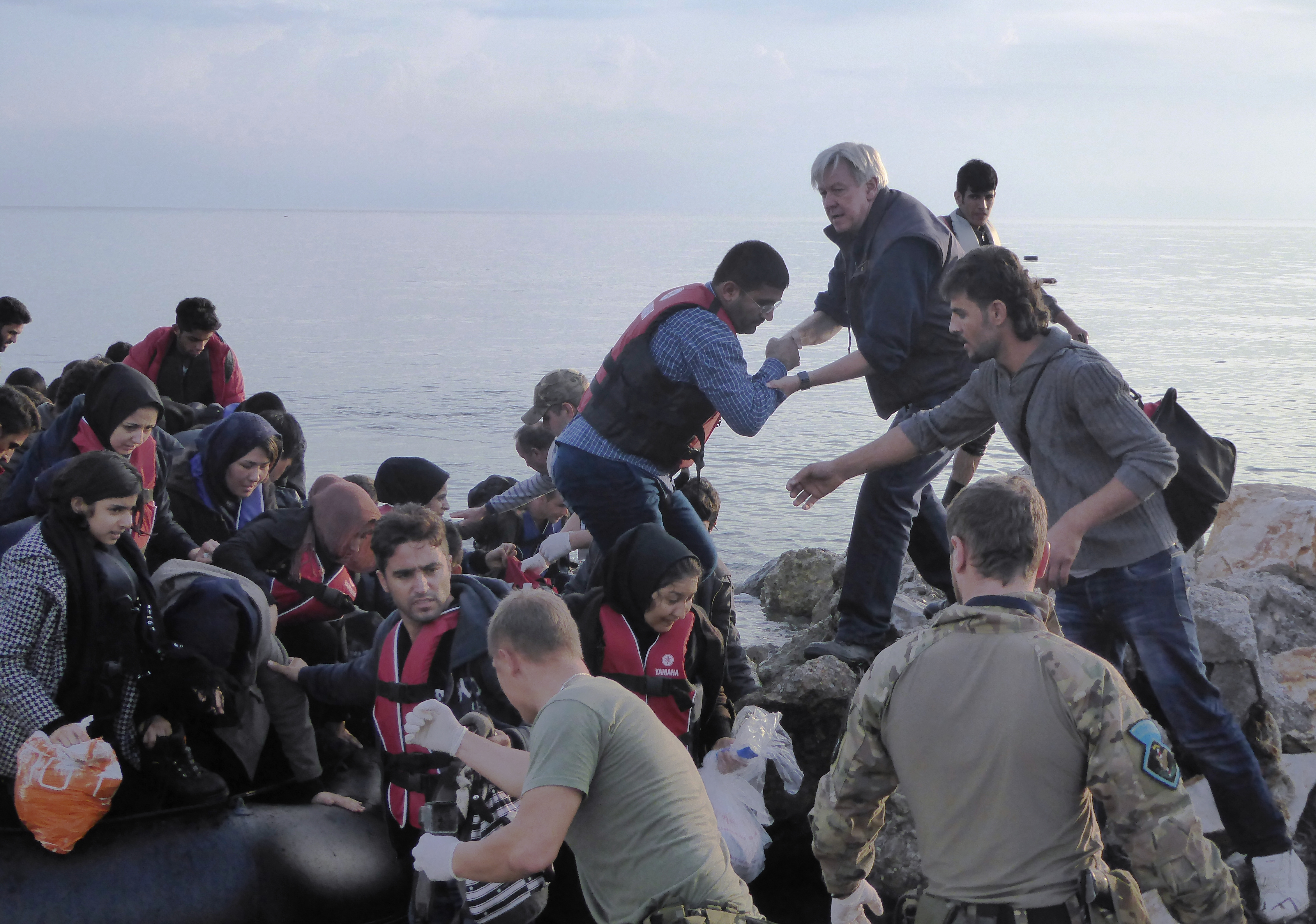 Bernd Ruf hilft auf Lesbos Geflüchteten an Land.